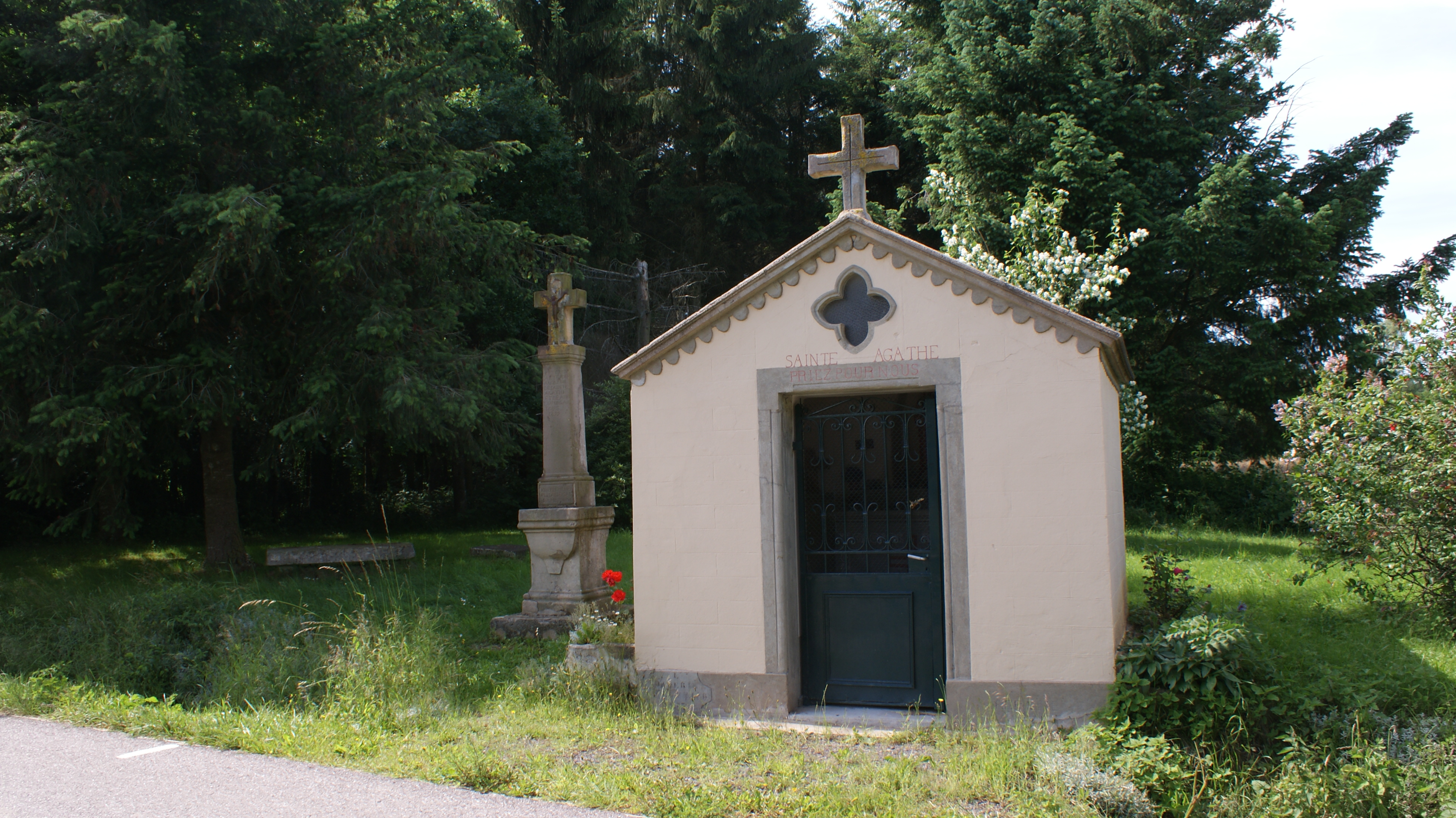 chapelle sainte Agathe située entre Neuviller lès Badonviller et Saint Maurice aux Forges.